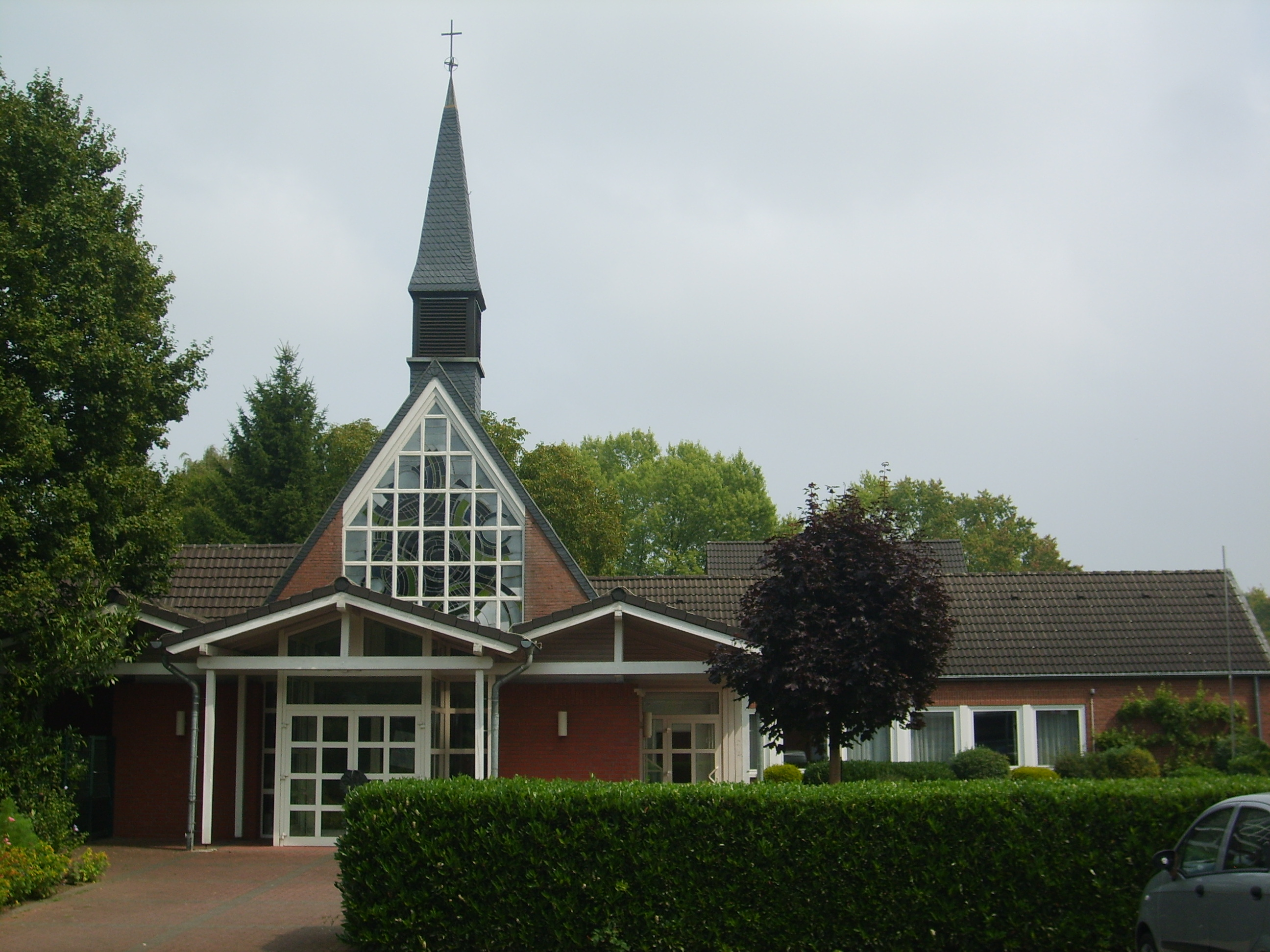 Foto der Friedenskirche in Neuss-Norf von der Straße aus. Von mir, Adbo2009 fotografiert